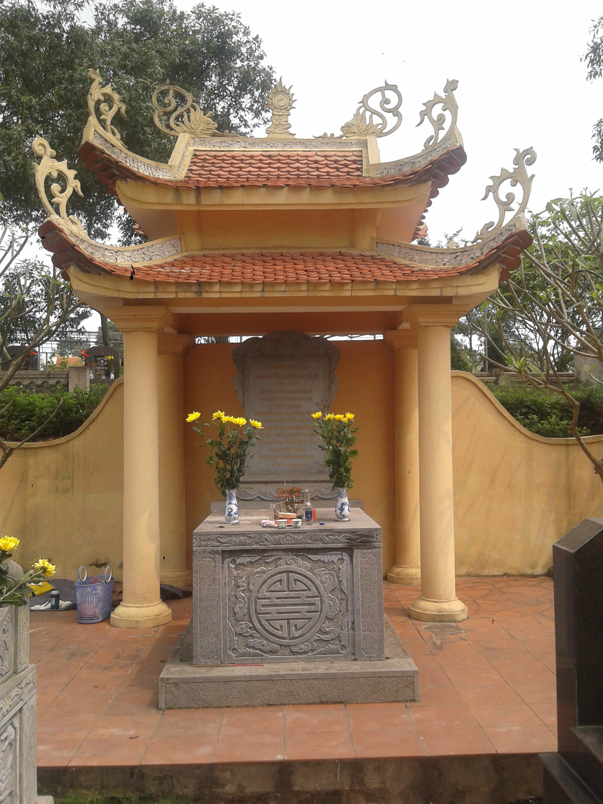 Nghĩa trang Vĩnh Hằng, Hà Nội